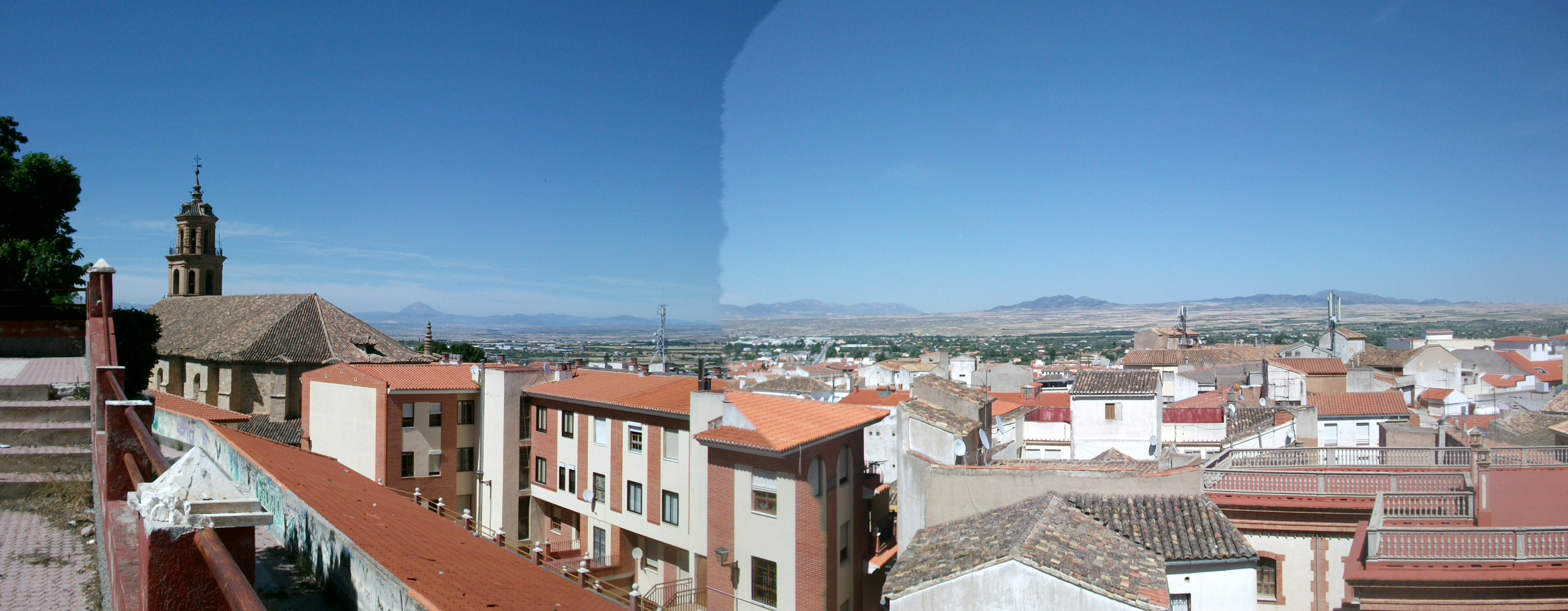 Panorámica de Baza desde la Alcazaba